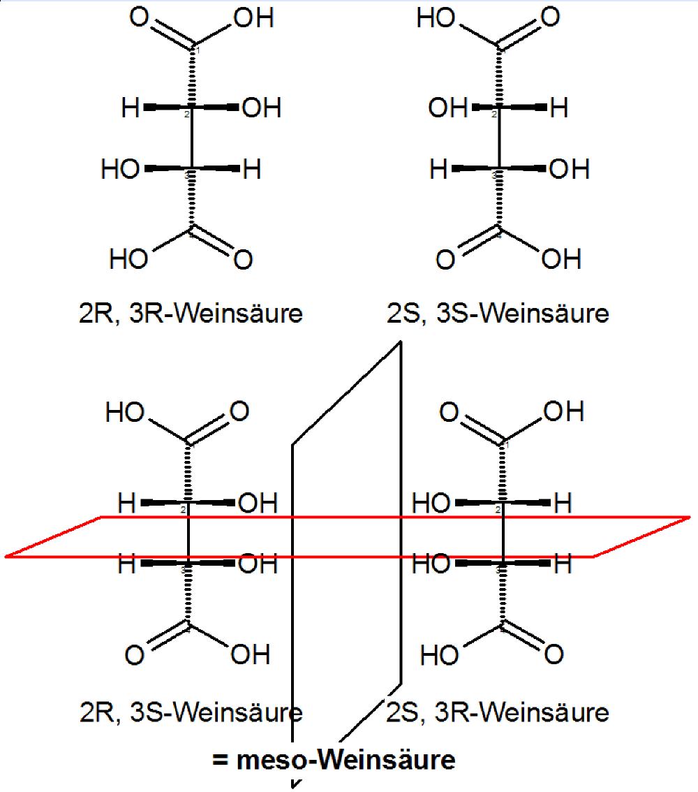 Isomere der Weinsäure in Fischer-Projektion und die meso-Formen nochmal, erstellt mit XDrawChem